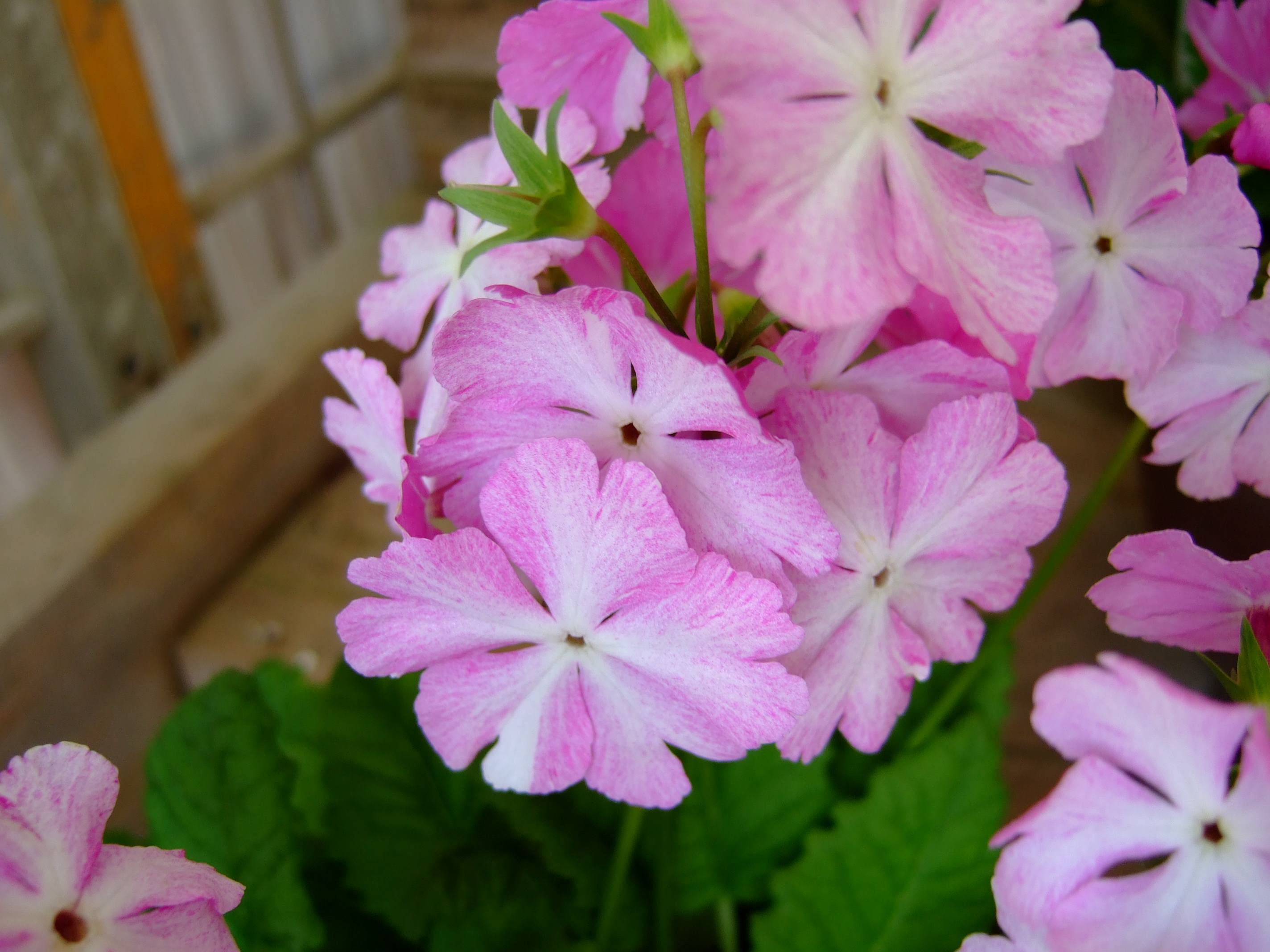 兵庫県立フラワーセンター サクラソウ